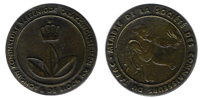 Voor- en achterkant van een pening van Sigarenfabriek Mignot & De Block Categorie:Wikipedia:Afbeeldingen/Gebruiker:Luijt